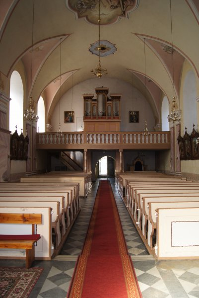 Lubrza – kościół parafialny p.w. św. Jakuba, 1600, XVIII w. (zabytek nr 567/59 z 3.04.1959)